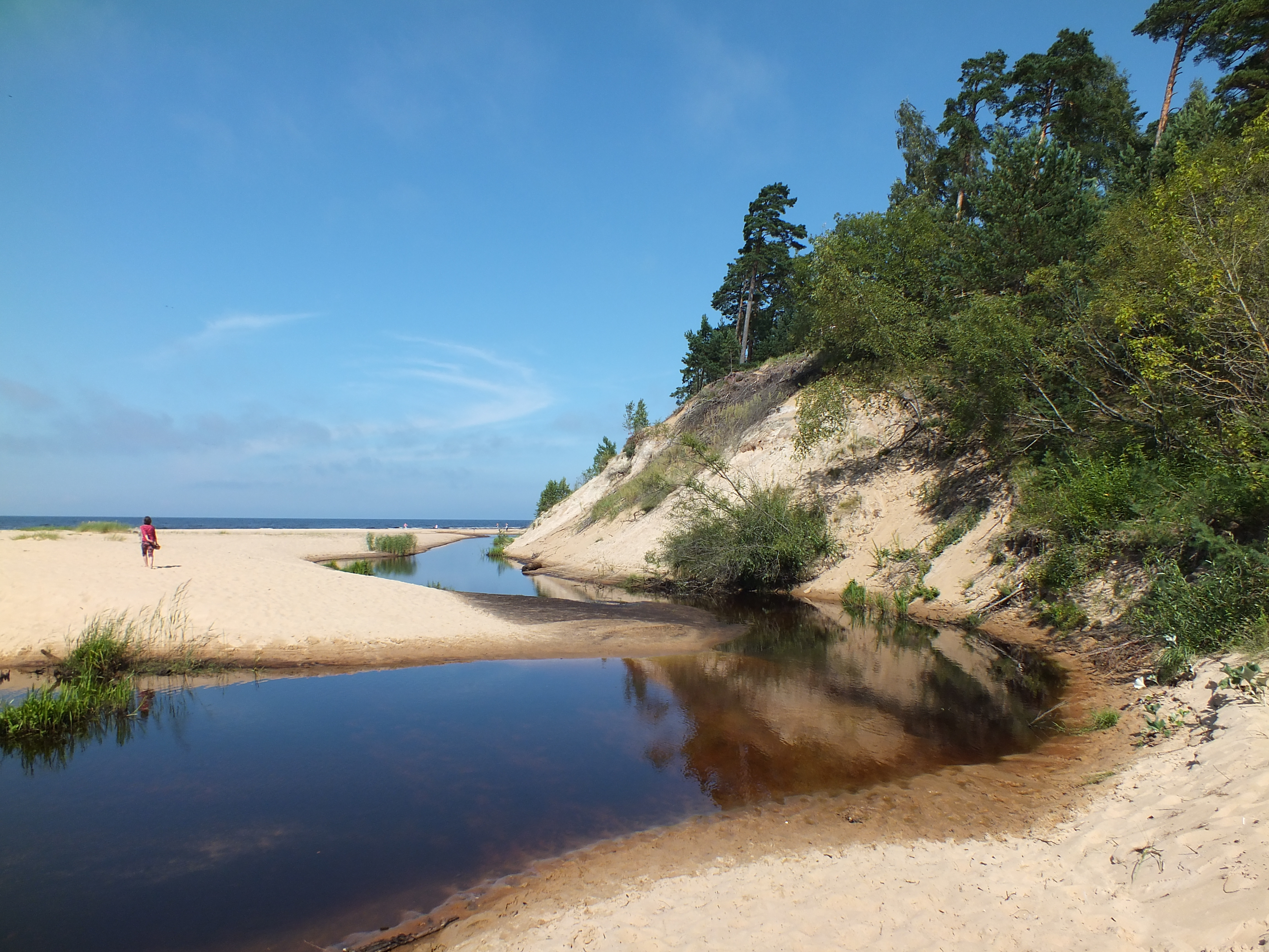 Inčupe pie Baltās kāpas